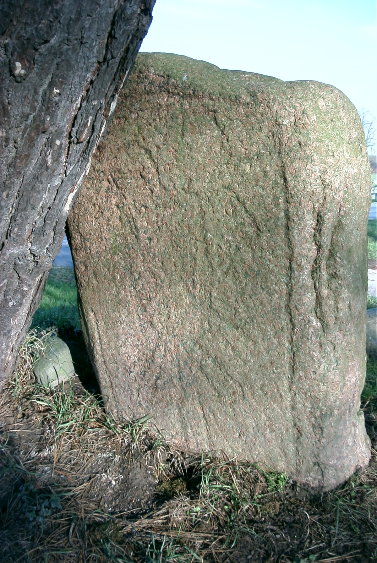 Rückseite Wartislawstein mit Figur - 2002 noch mit Baum (l.)